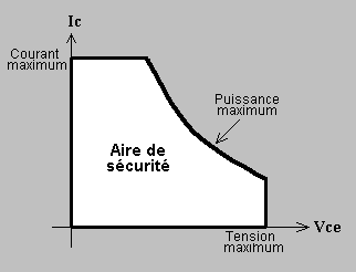 Vue générique de la SOA d'un IGBT ou d'un bipolaire